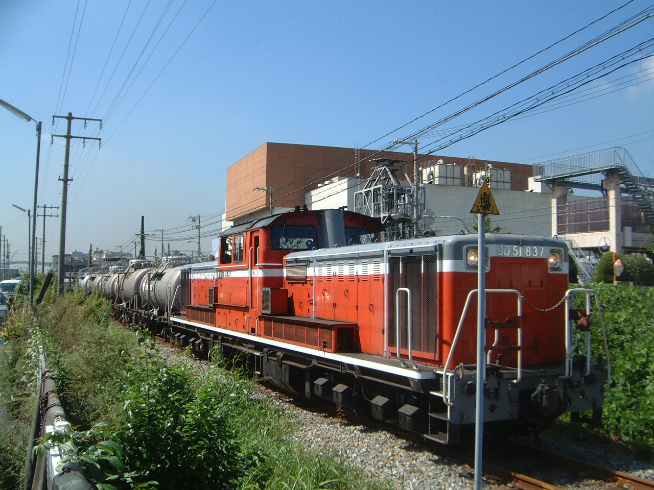 大阪臨港線浪速駅を発車した貨物列車